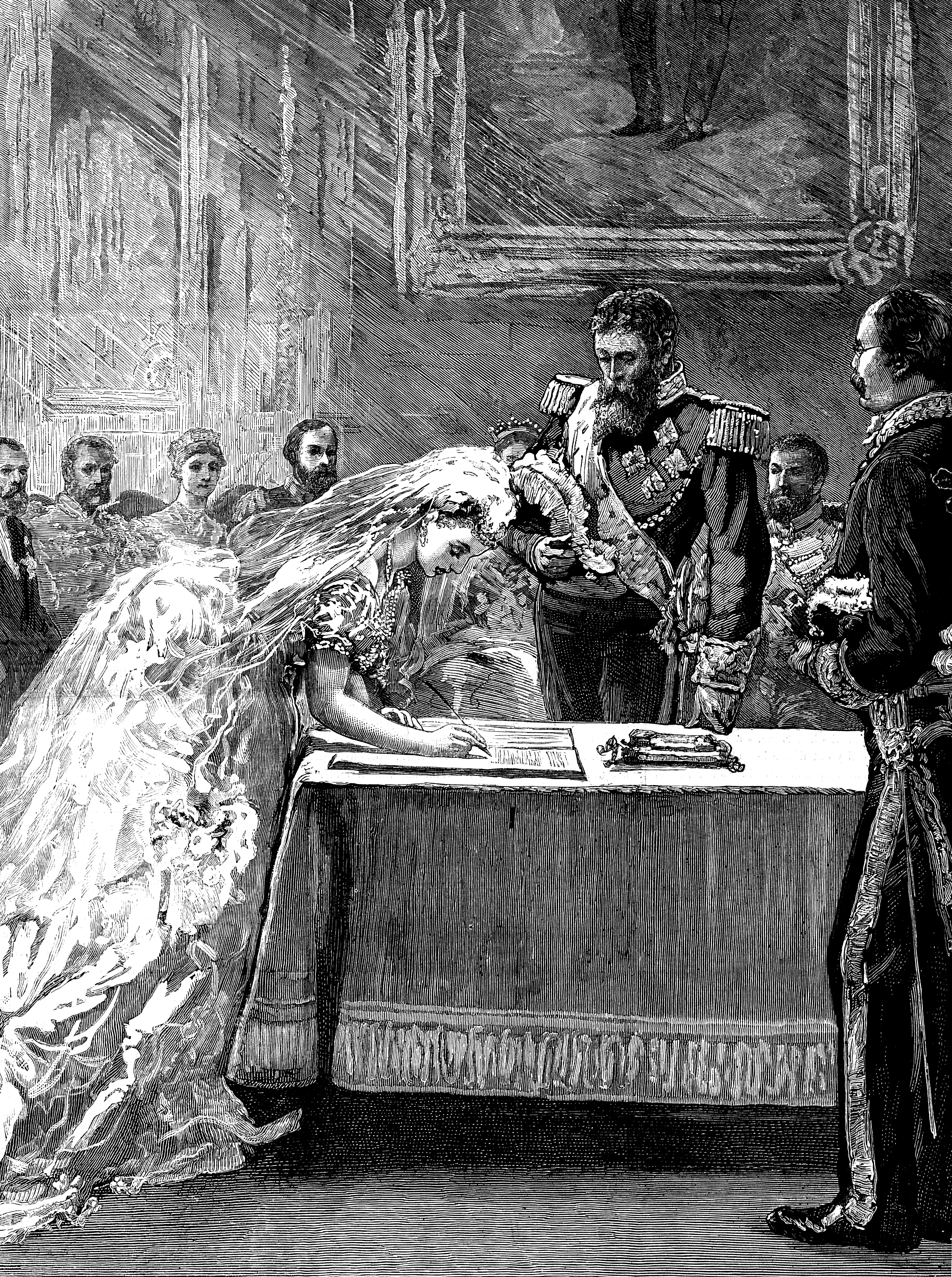 Mariage de la princesse Louise de Belgique avec le prince Philippe de Saxe-Cobourg-Gotha-Kohary, Palais royal (Bruxelles), le 4 février 1875. — Le mariage civil est célébré dans le Salon bleu par le bourgmestre de Bruxelles, Jules Anspach, que l’on voit sur la droite de la gravure en uniforme civil (très similaire aux uniformes militaires de l’époque). Le prince Philippe porte l’uniforme de major de l’armée hongroise (Honvéd) et le grand cordon de l’ordre de Léopold.